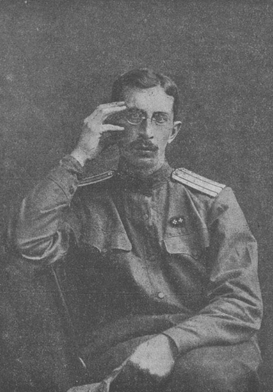 Александр Иванович Верховский, русский офицер, Военный министр Временного правительства.